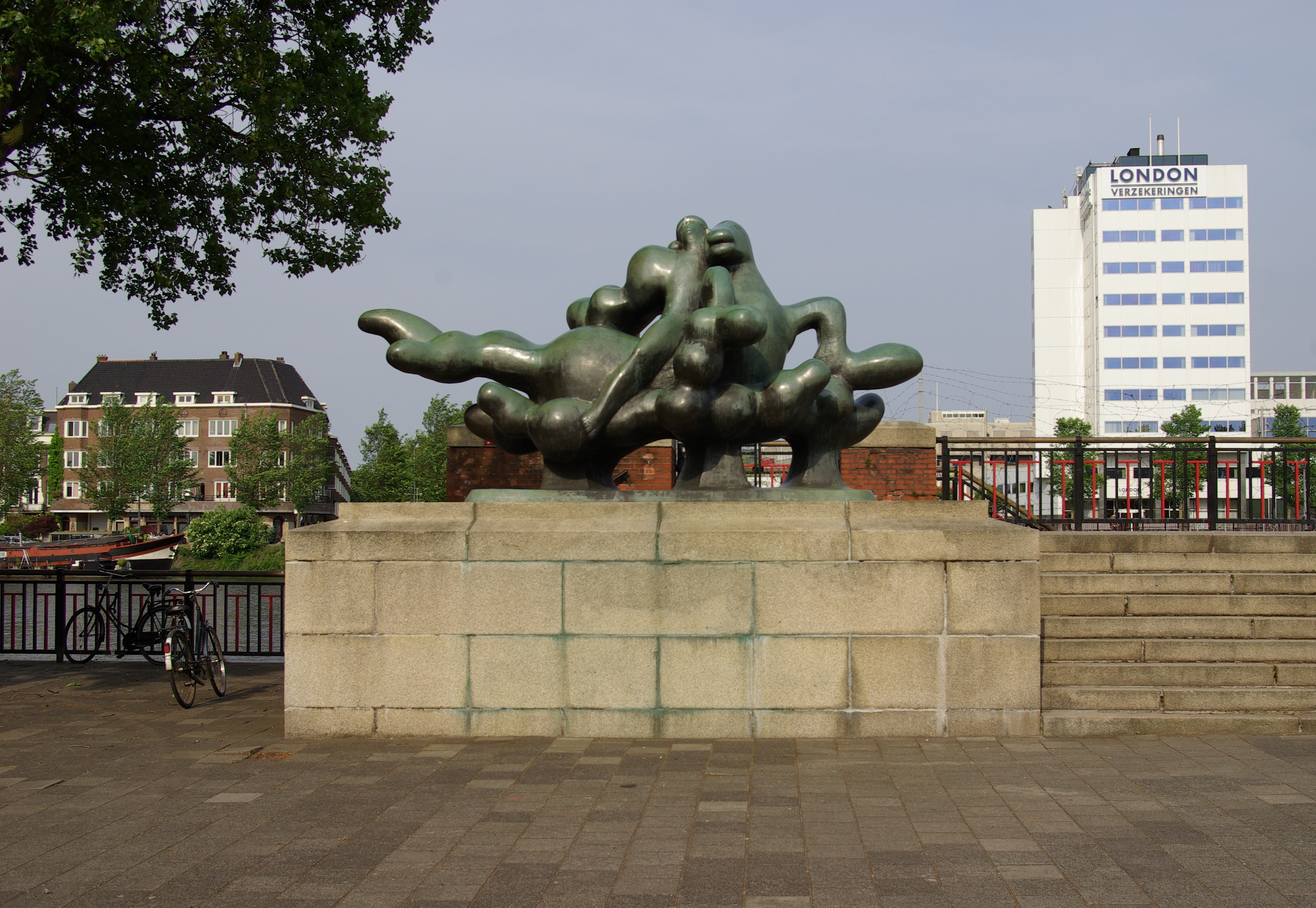 Amsteldijk, Amsterdam with Nereus (1969) by Nic Jonk